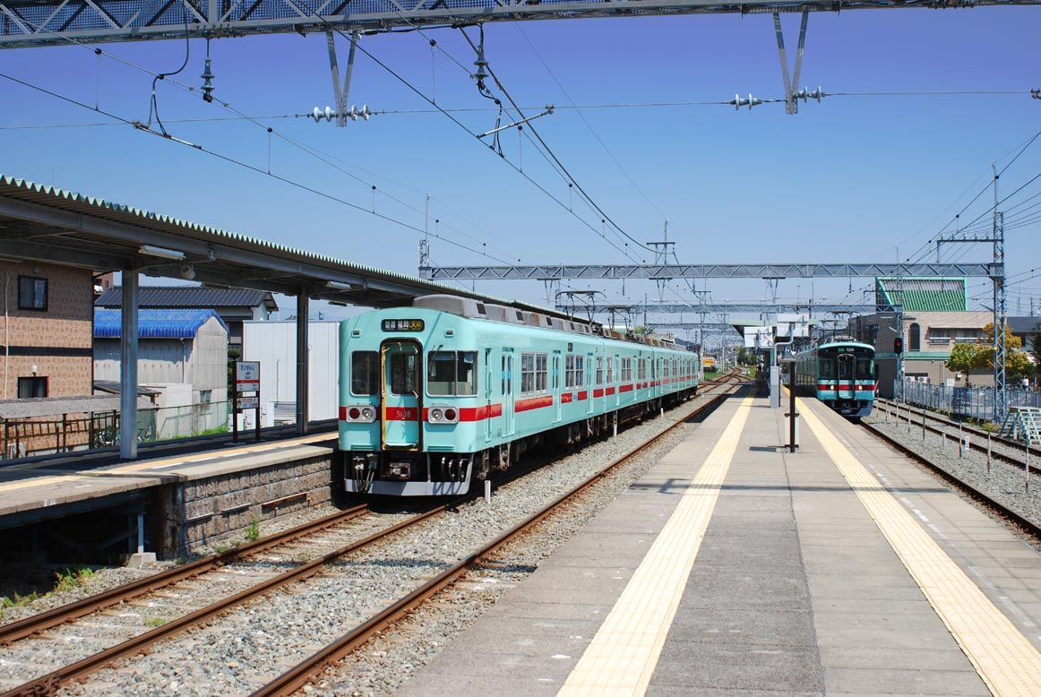 西鉄天神大牟田線大善寺駅構内（自ら撮影したものをＵＰ）